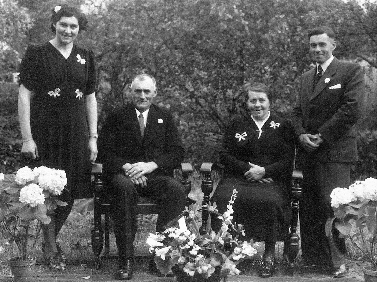 De familie Verbakel-Aarts